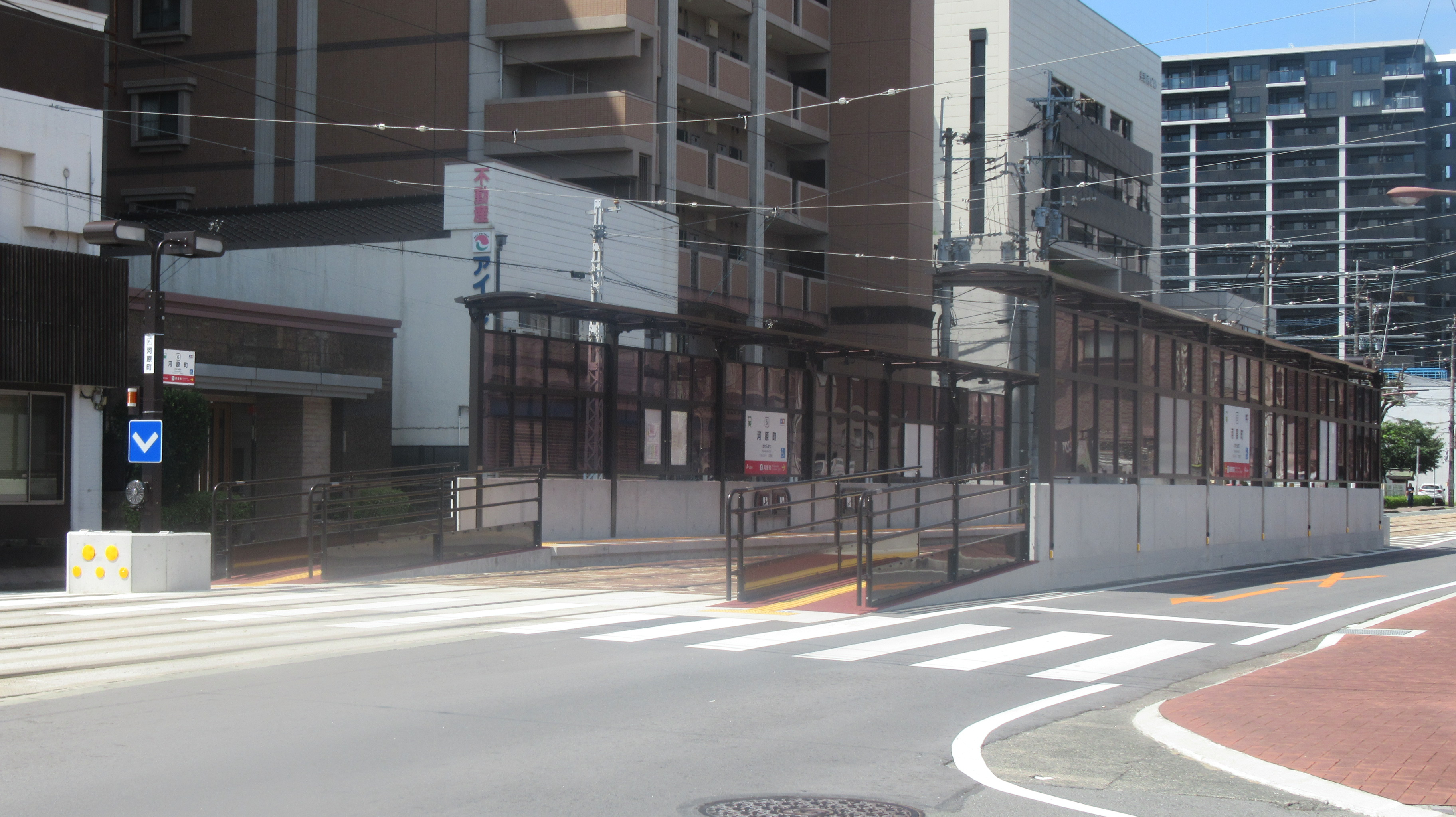 河原町停留場（2019年9月）